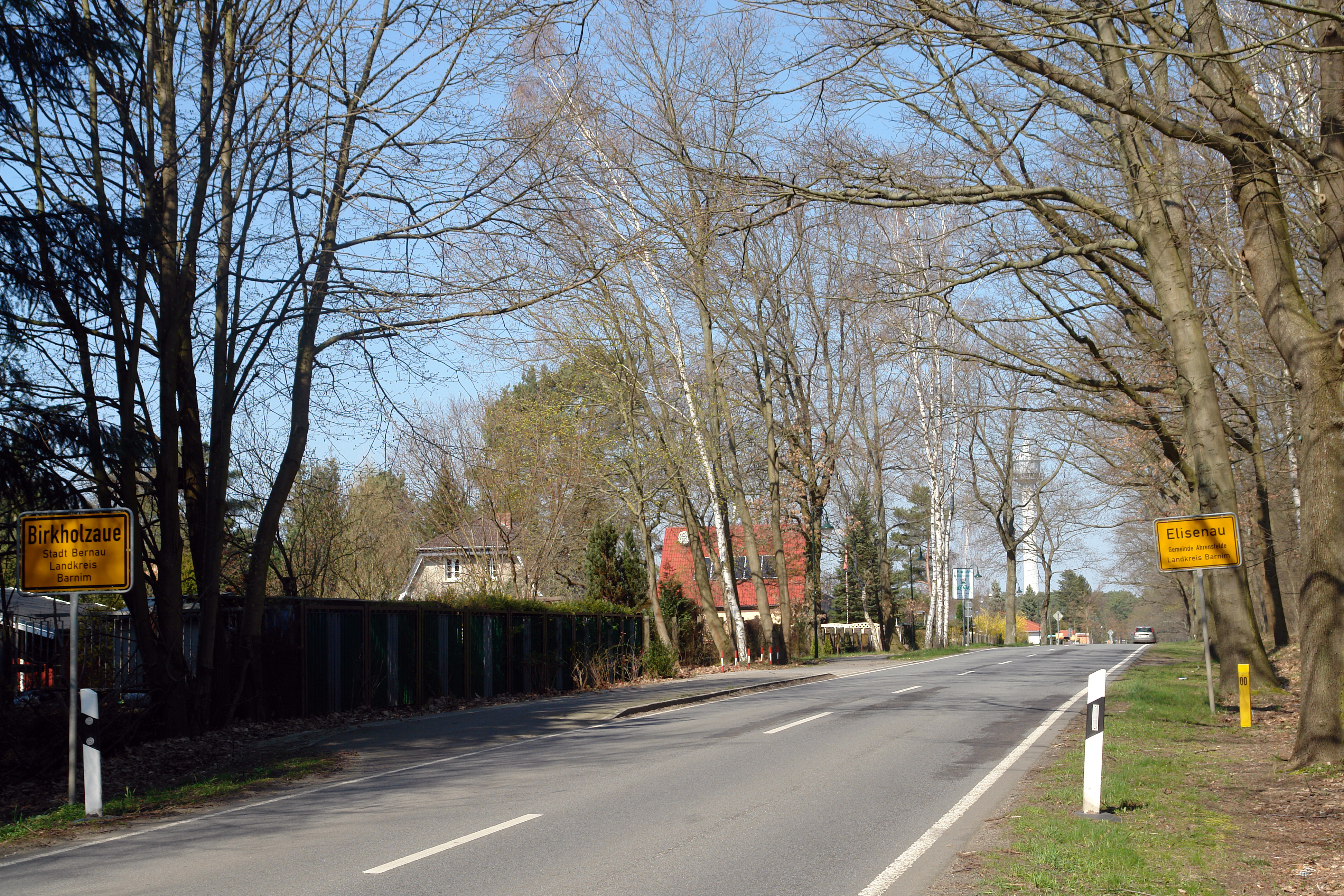 Ortseingangsschilder Birkholzaue und Elisenau an der Bernauer Chaussee